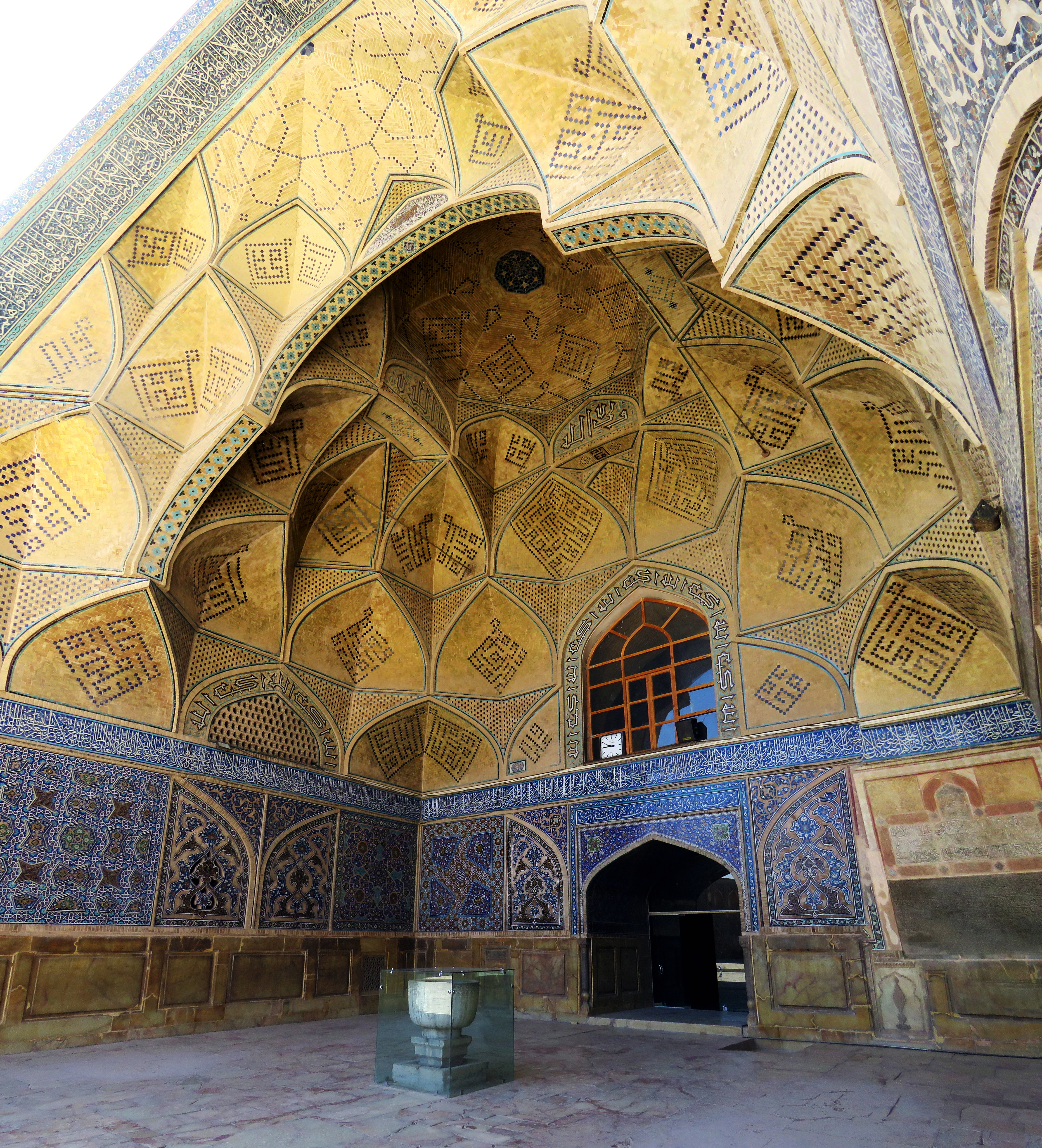 مسجد جامع اصفهان ایوان جنوبی